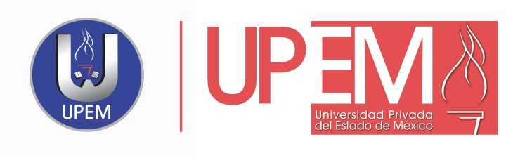 Escudo de la Universidad Privada de Estado de México